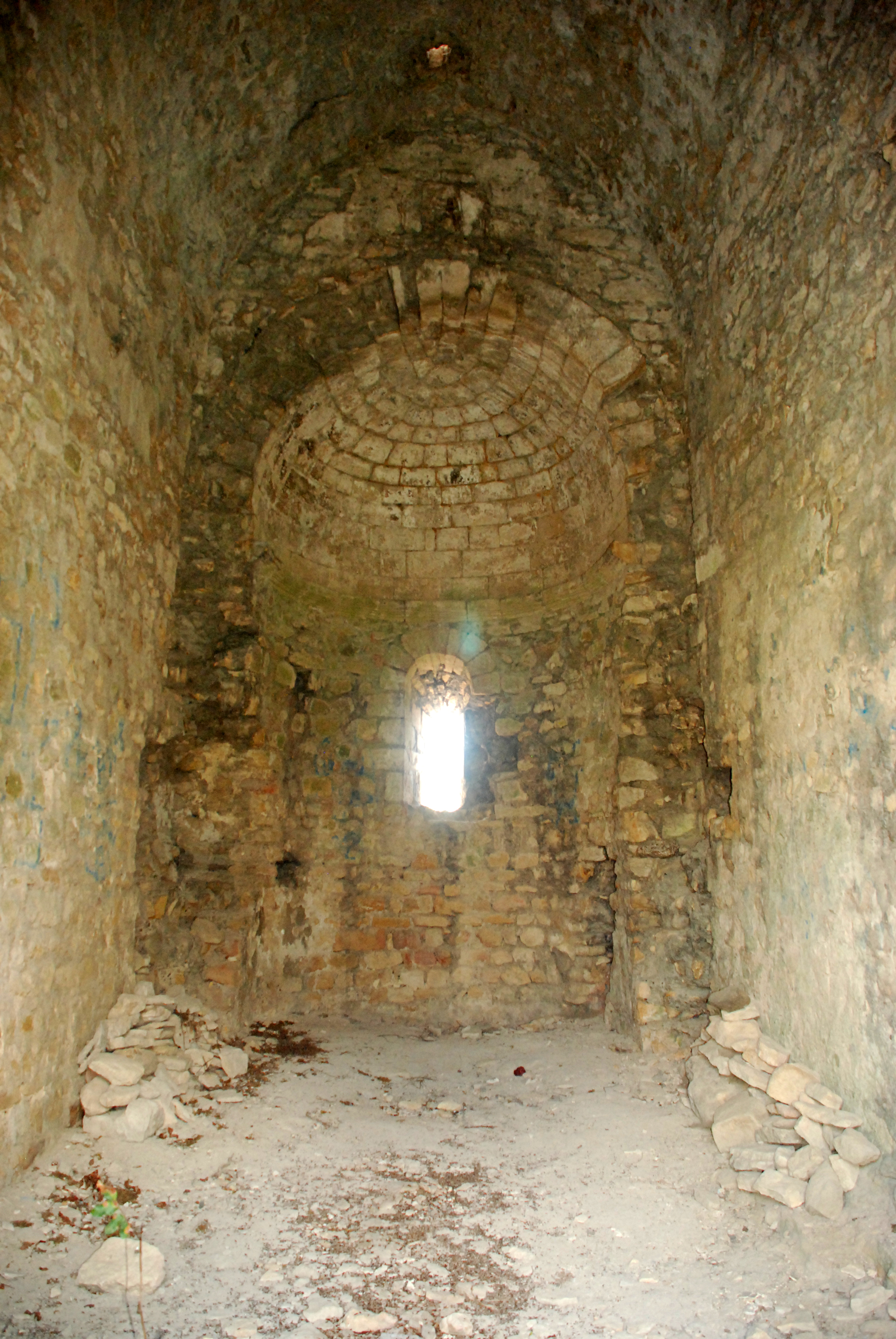 France - Gard - Saint-Étienne-des-Sorts - Chapelle Saint-Pierre